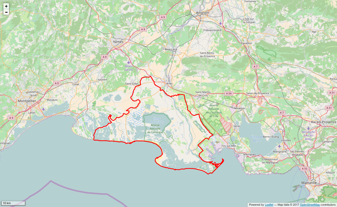 Périmètre du PNR de Camargue.